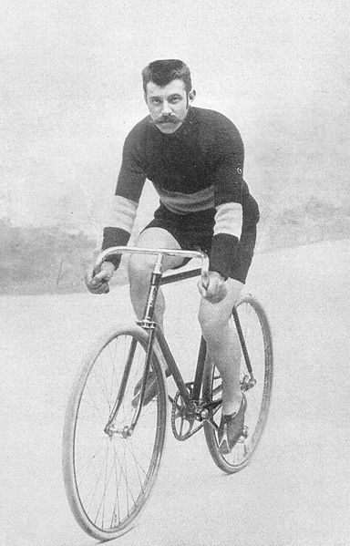 Mathieu Cordang, cycliste néerlandais